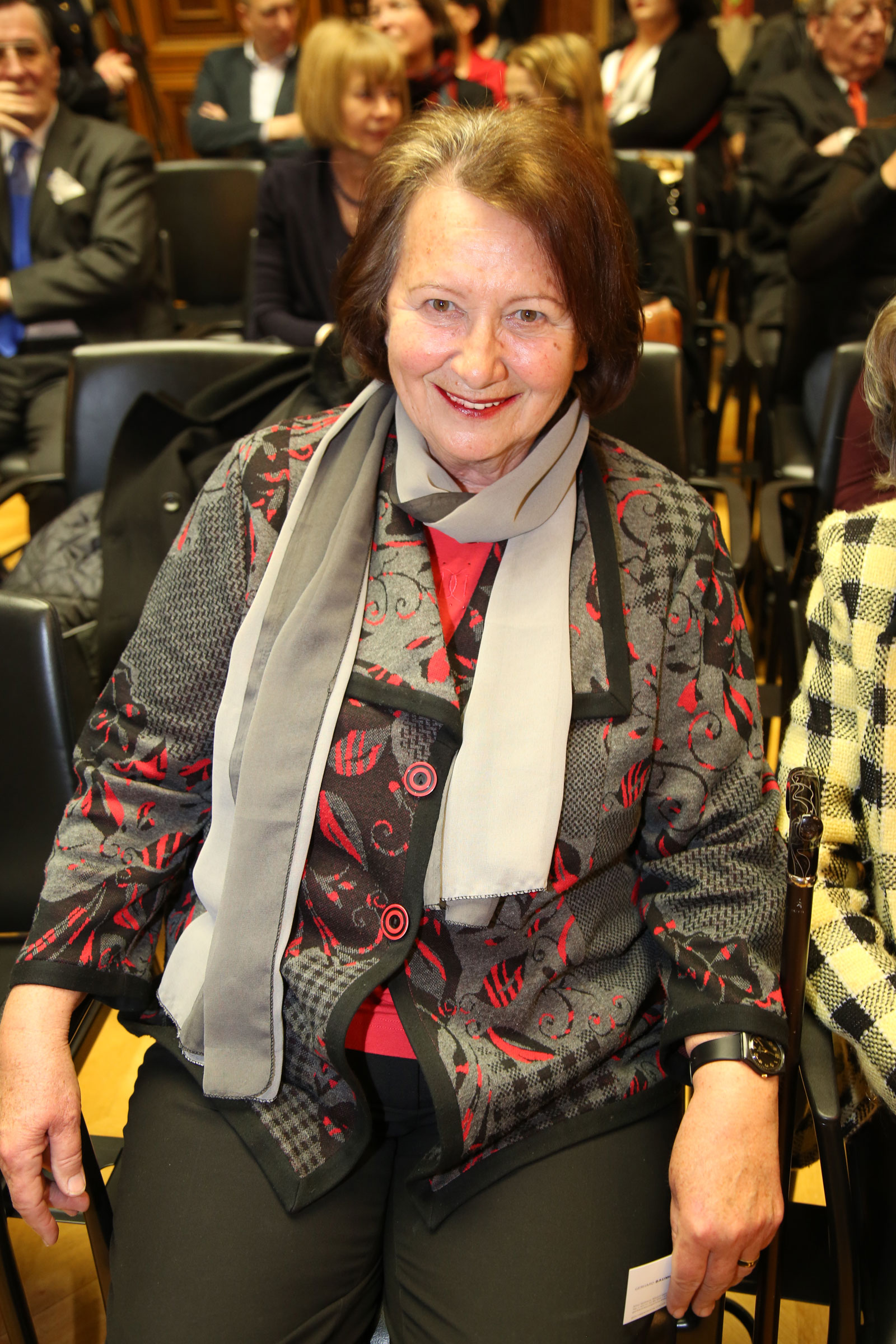 Hawlicek.Hilde-6522